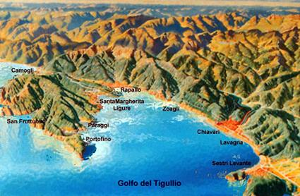 Mappa geografica del Tigullio